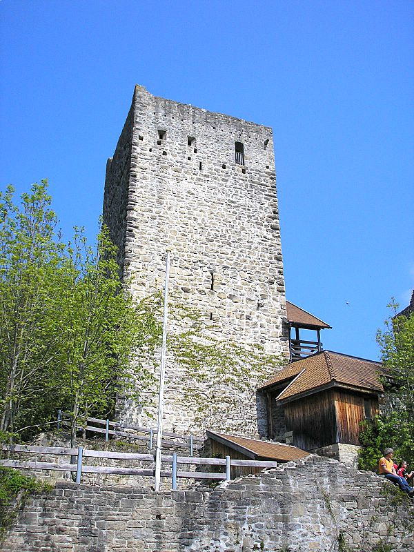 Burg Sulzberg (Markt Sulzberg, Landkreis Oberallgäu, Bayerisch-Schwaben). Der Bergfried von Südosten. Eigene Aufnahme, Mai 2008 / Sulzberg castle near Sulzberg (Landkreis Oberallgäu, Bavaria, Germany). The keep from the south east. Own photo, May 2008